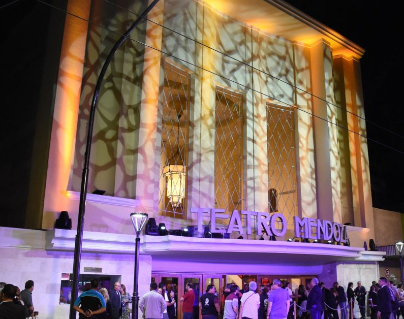 Entrada del Teatro Mendoza - Día de reinauguración.